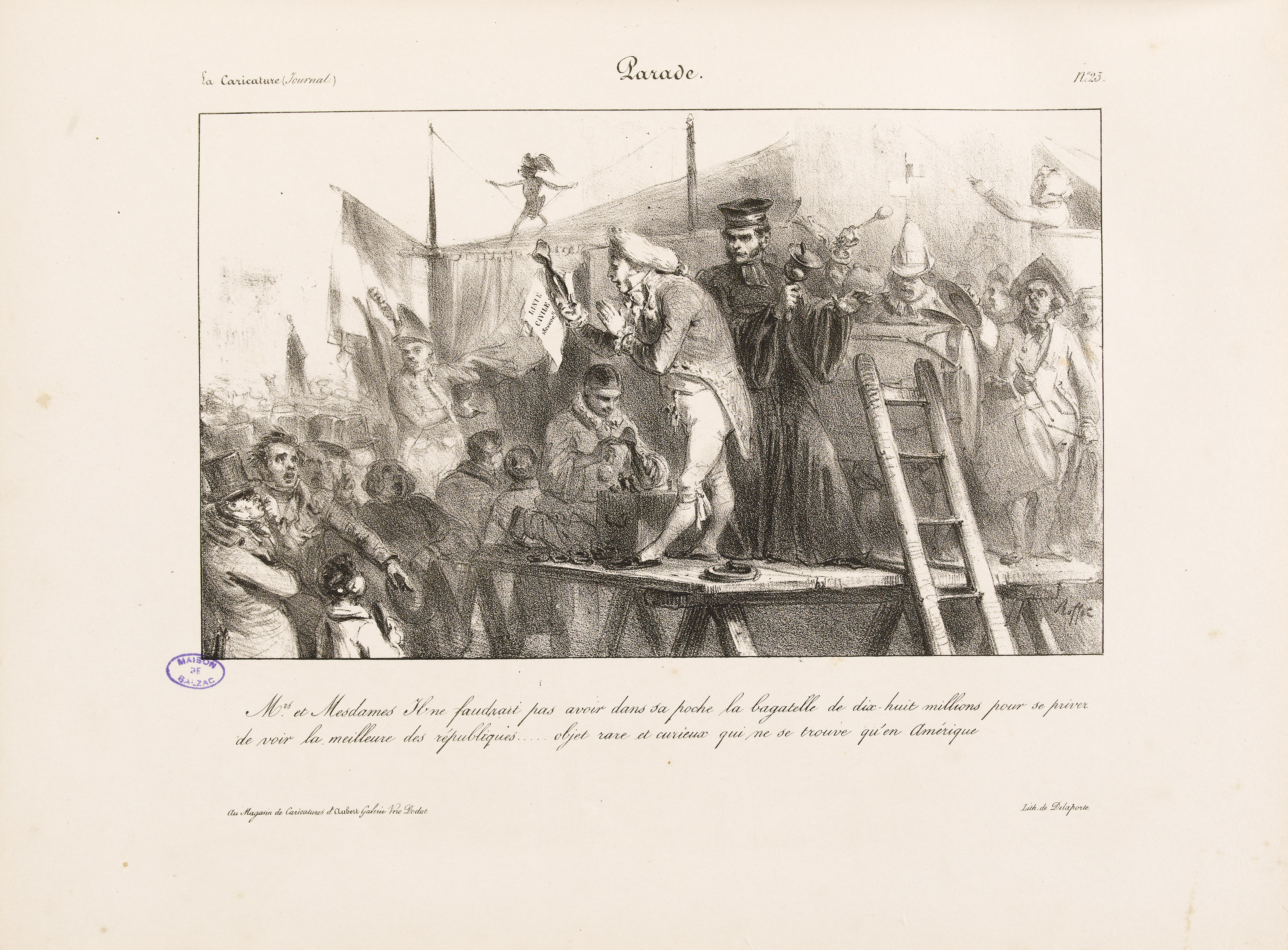 Livrei